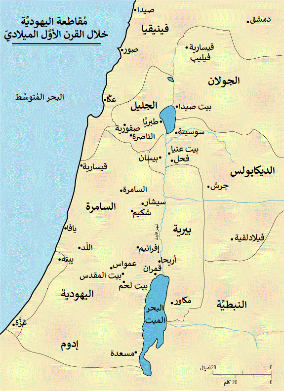 مُقاطعة اليهوديَّة الرومانيَّة خلال القرن الأوَّل الميلادي.